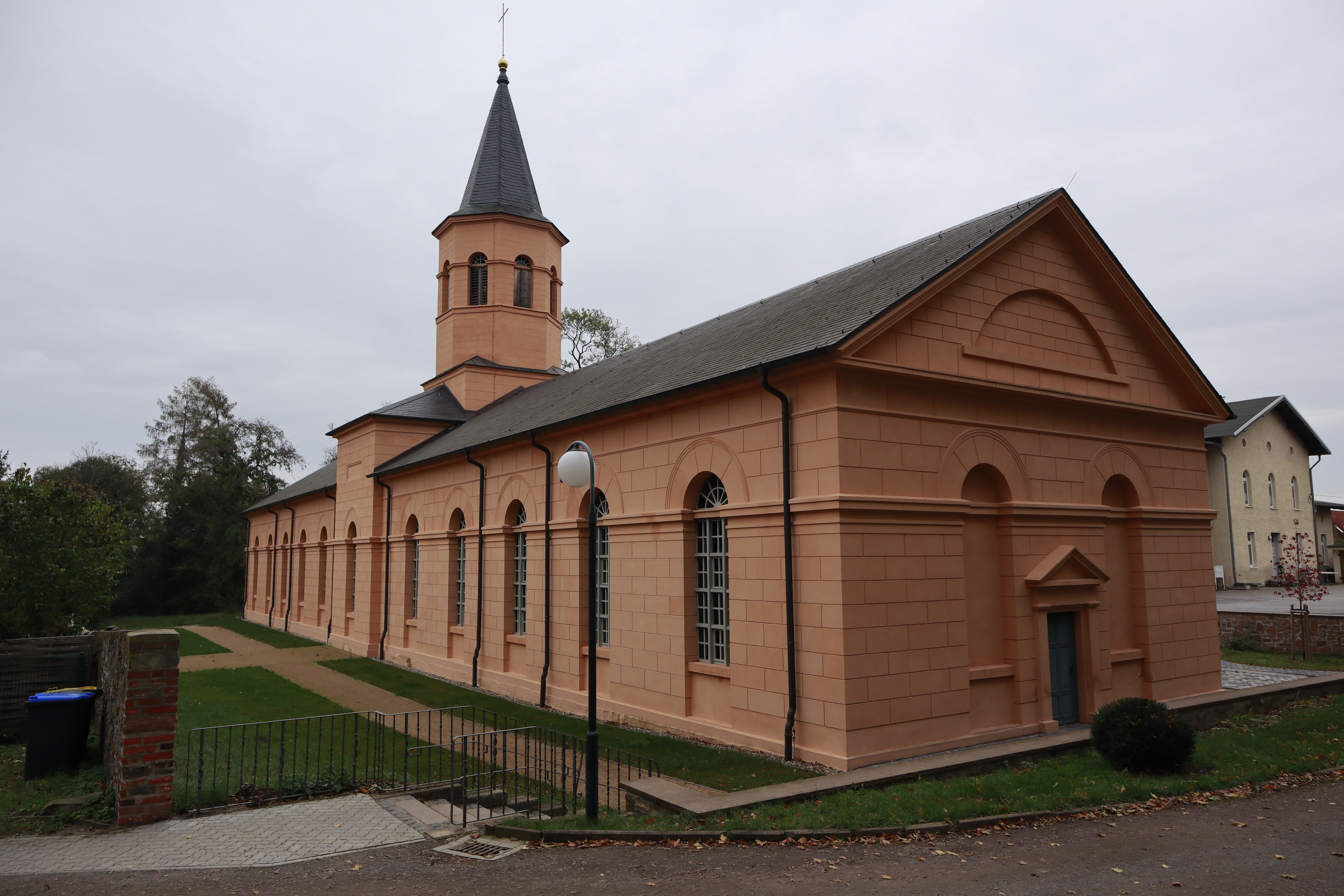 Althaldensleben, Simultankirche